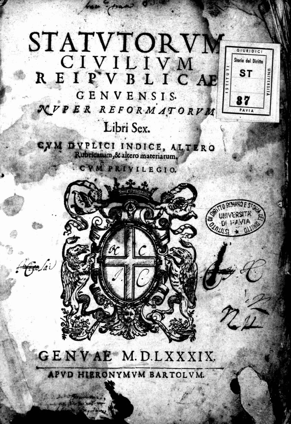 Frontespizio